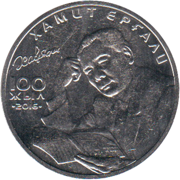 100 лет со дня рождения Хамита Ергалиева